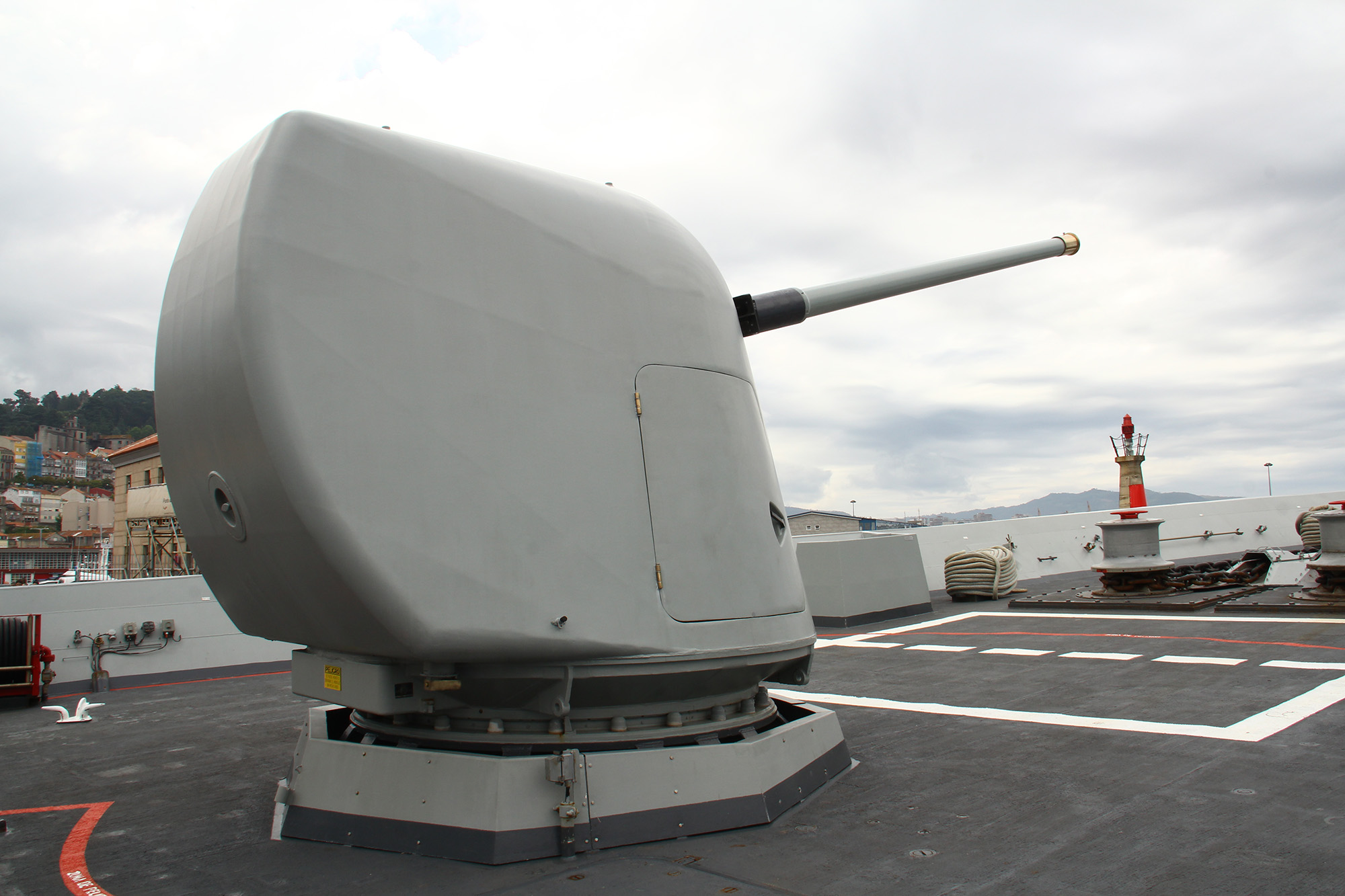 Visita a Vigo de las fragatas "Álvaro de Bazán" F-101 y "Almirante Juan de Borbón" F-102 de la Armada Española, ambas de la clase "Álvaro de Bazán" (también conocida como F-100), el 27 y 28 de mayo de 2017. Frigates F-100 in Vigo Visit to Vigo of the frigates "Álvaro de Bazán" F-101 and "Admirante Juan de Borbón" F-102 of the Spanish Navy, both of the class "Álvaro de Bazán" (also known as F-100), May 27 and 28, 2017.